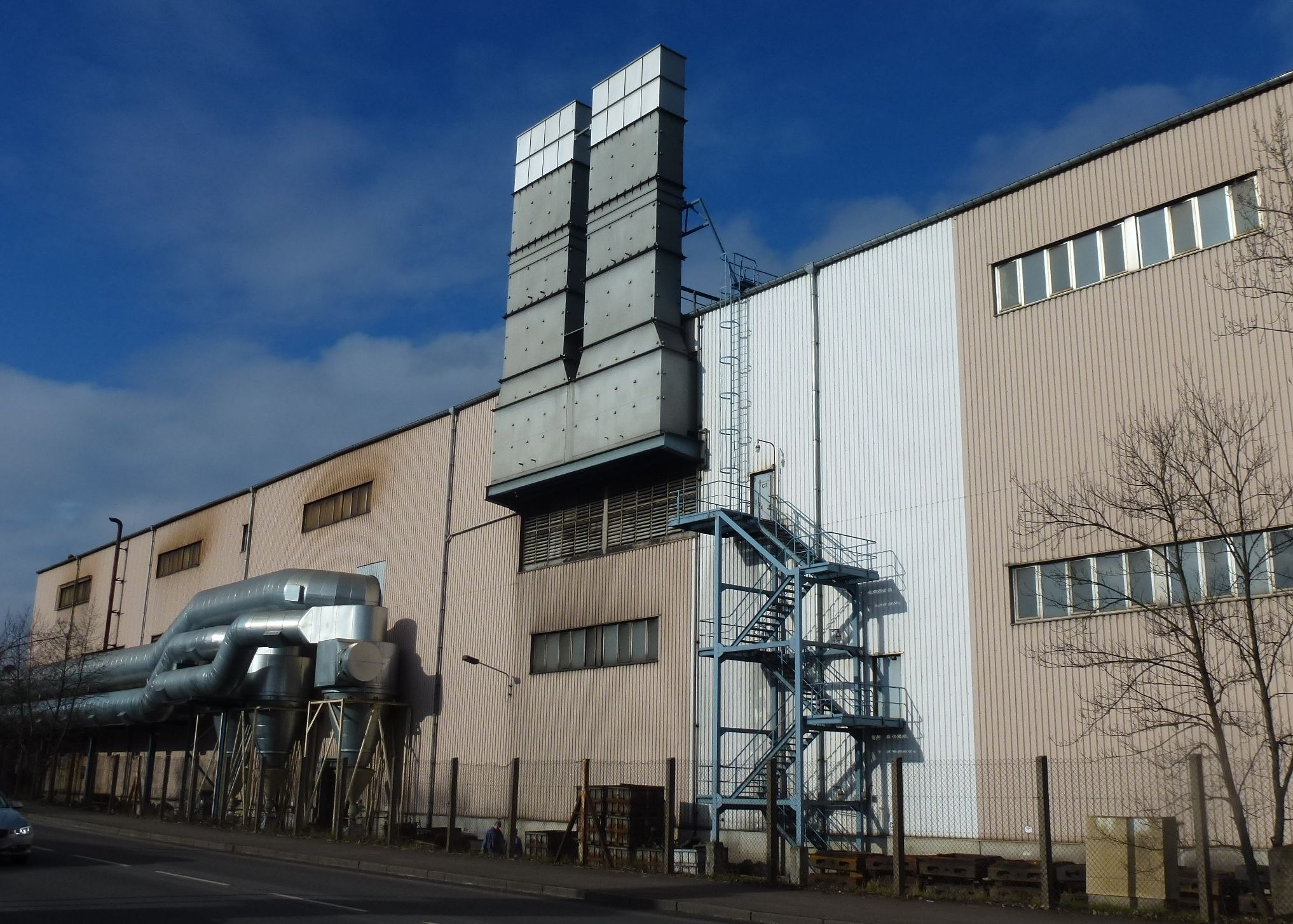 Hallberg-Guss in Leipzig